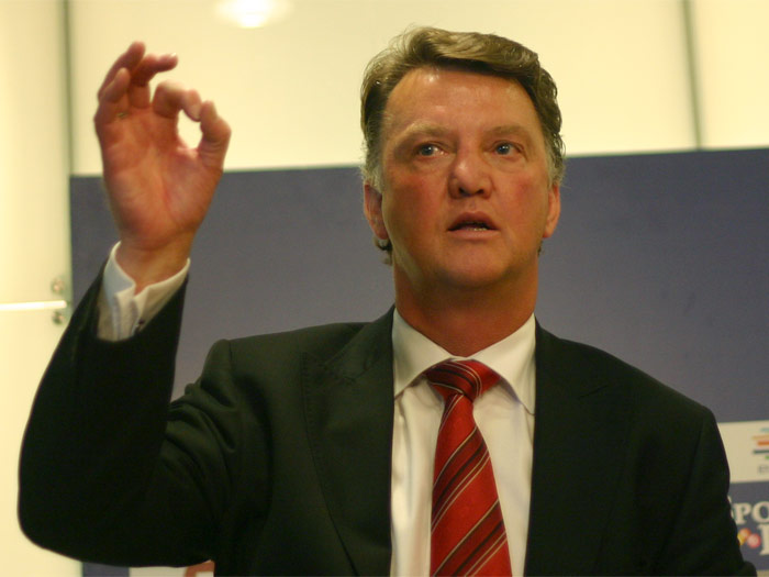 Louis van Gaal boos